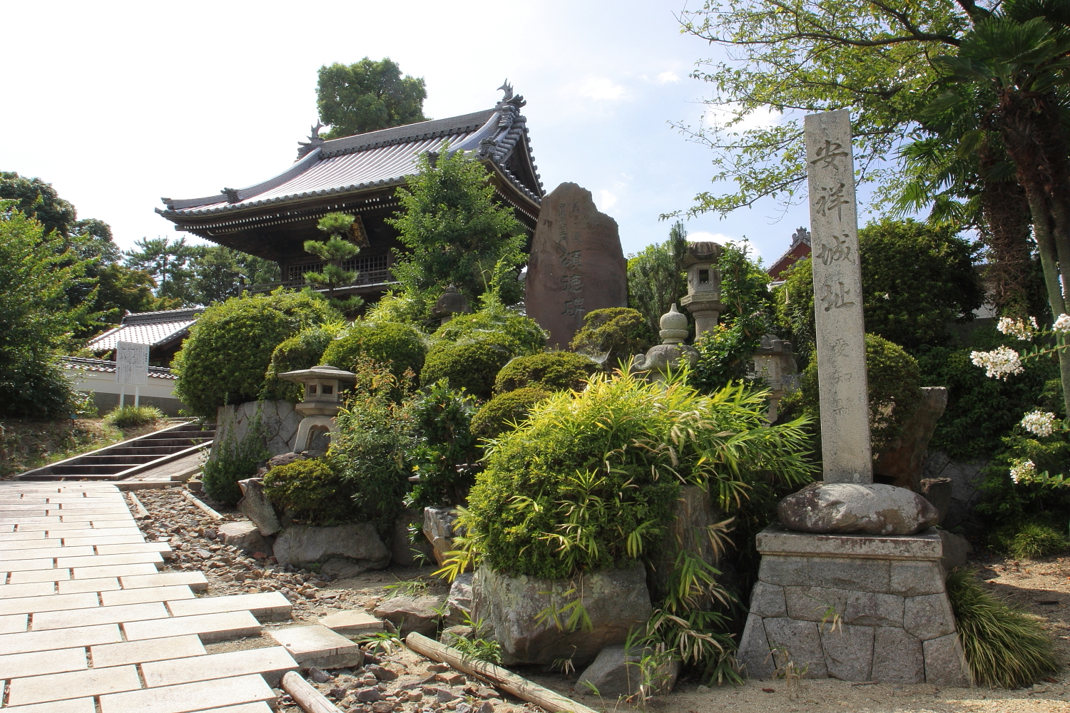 大乗寺参道（安城市安城町、2009年（平成21年）8月）